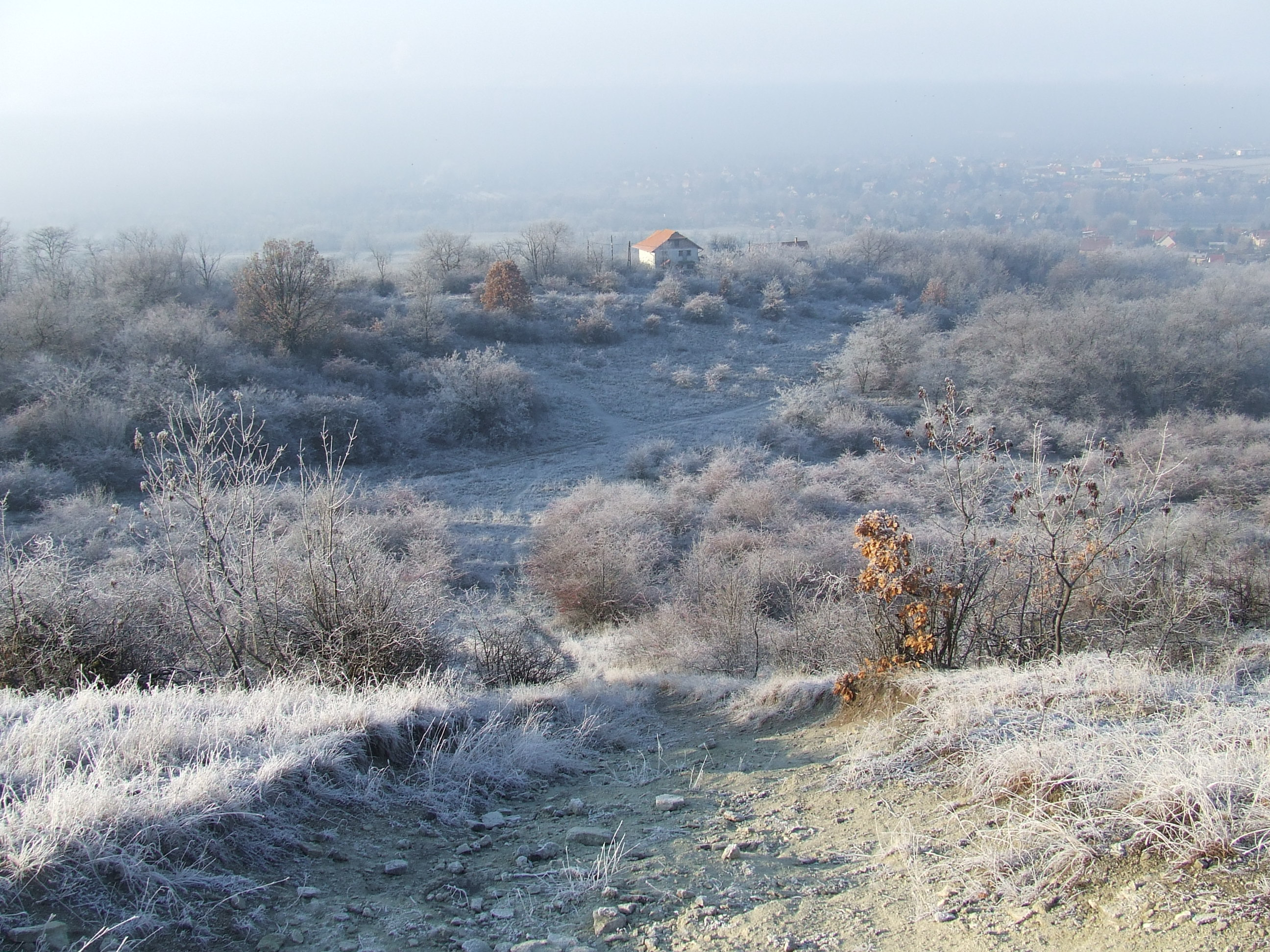 Fót, Somlyó